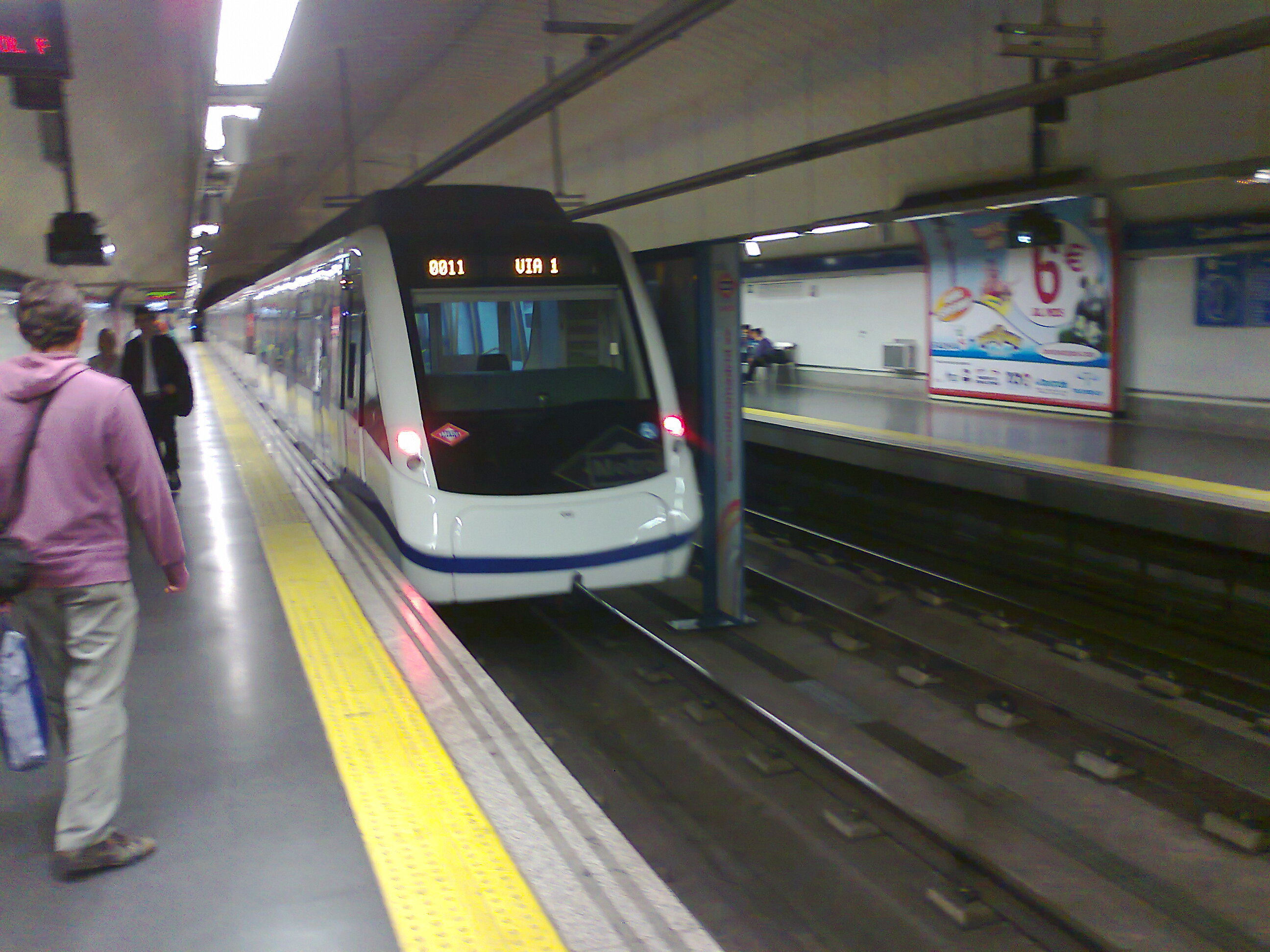 Tren de la serie 400 en el andén de la línea 6 en la estación de Cuatro Caminos, Madrid